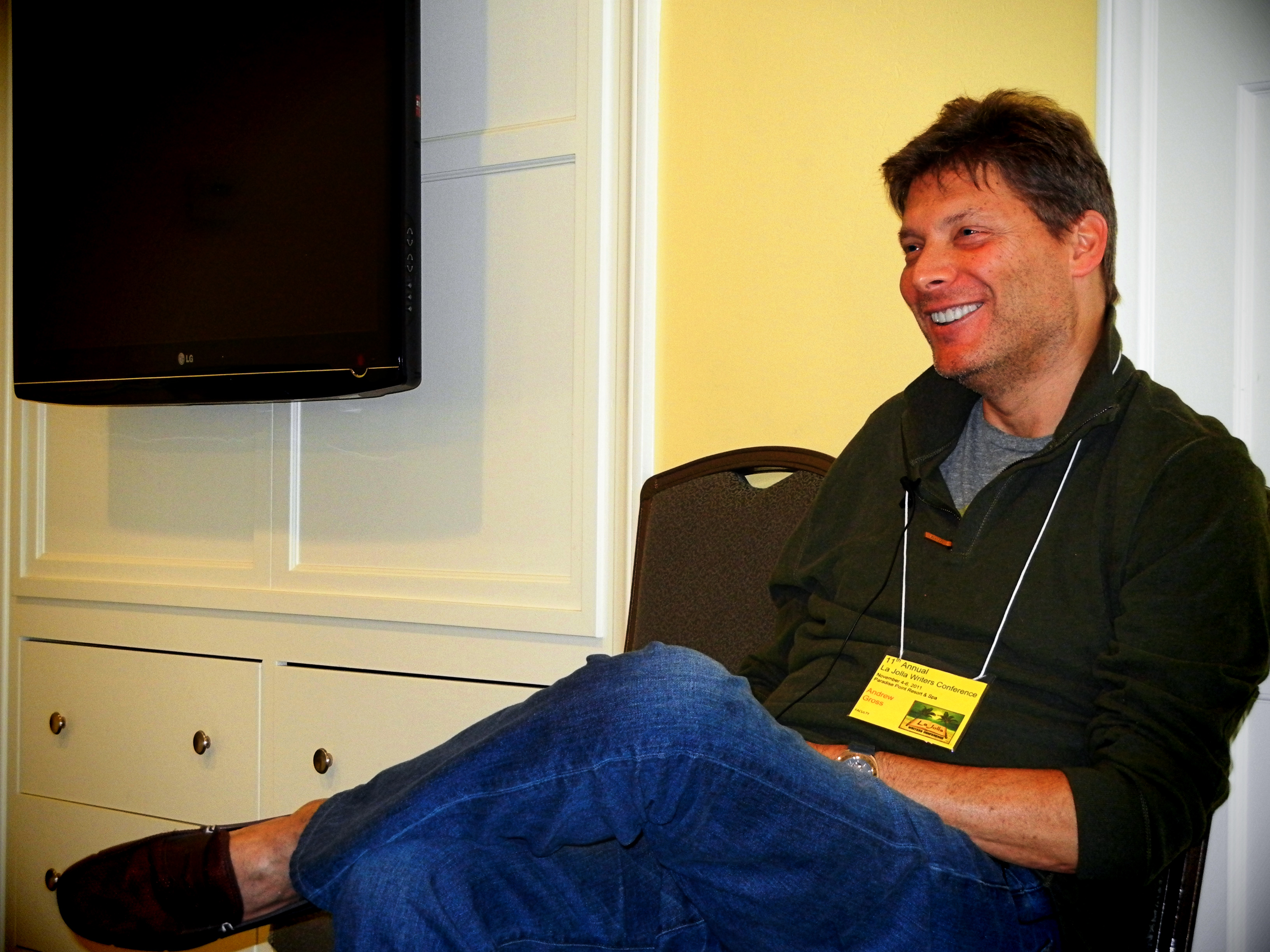 Andrew Gross